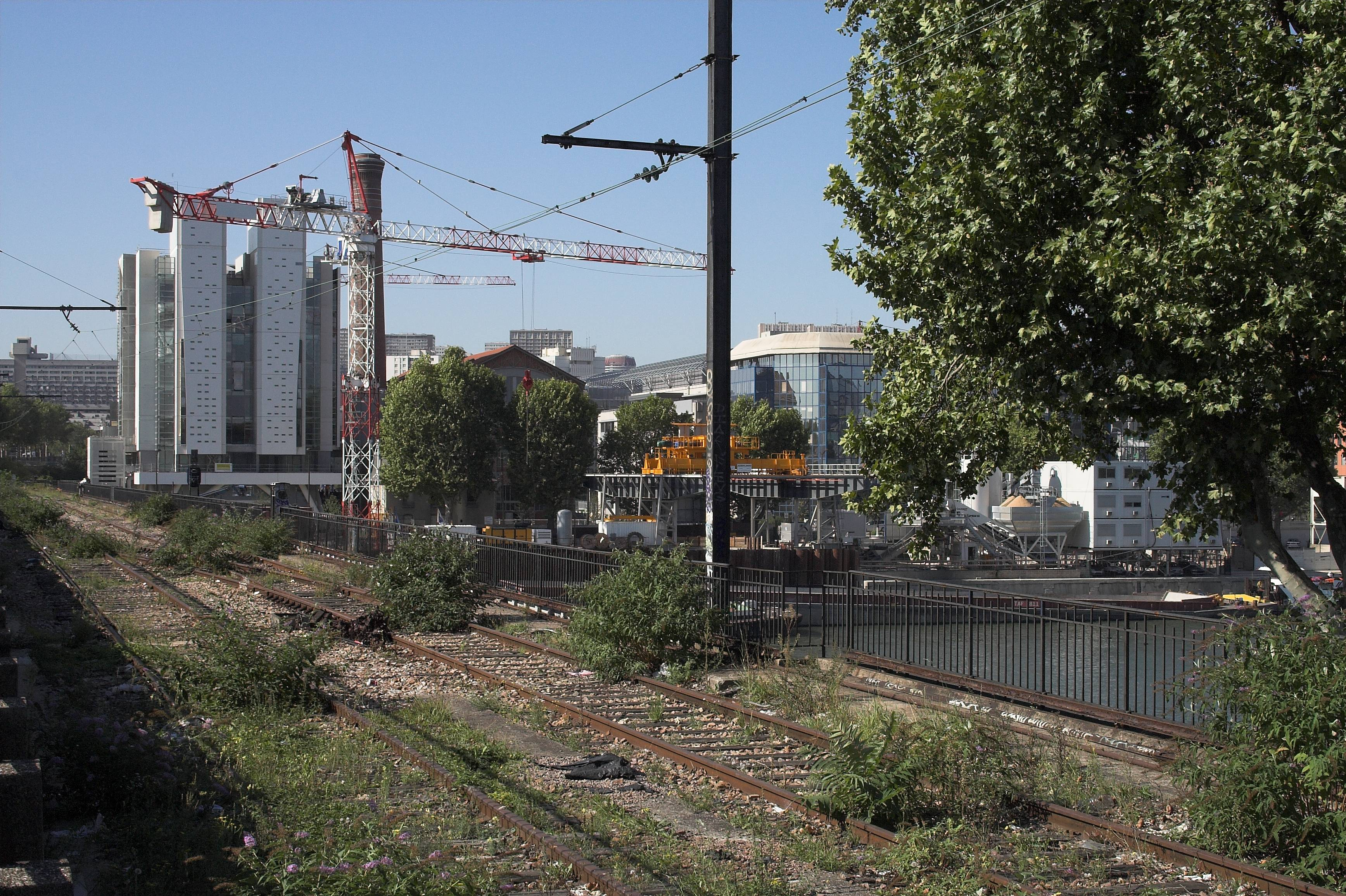 la ligne Petite Ceinture sur le Pont National(Paris, France)